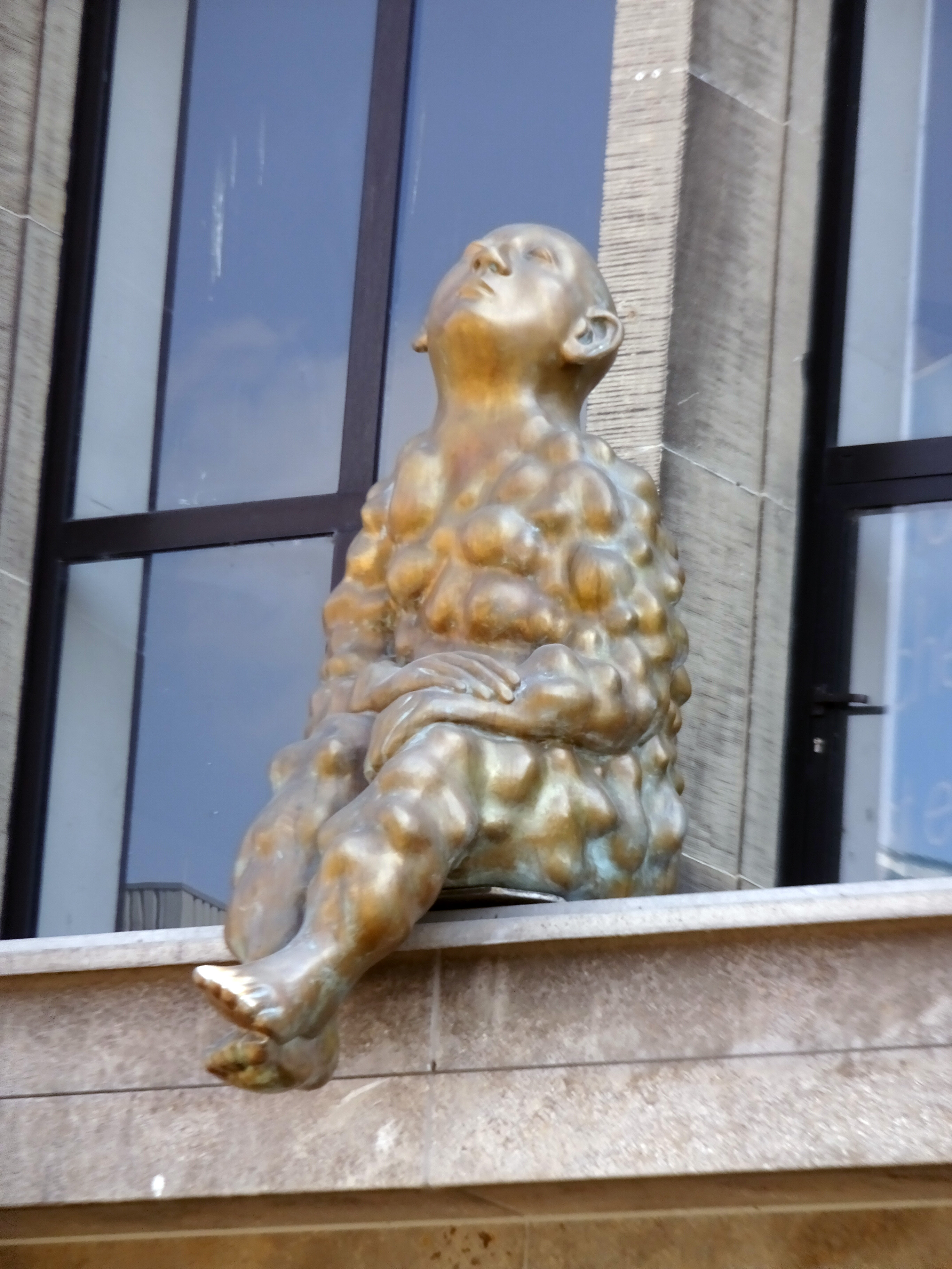 Beulenmann von Paloma Varga Weisz auf dem Vordach des Hauptbahnhof Düsseldorf, Konrad-Adenauer-Platz 14